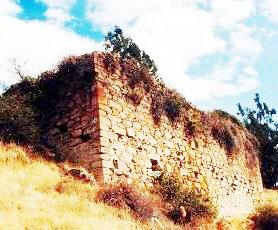 Arquitectura preinca, Pashas, Cabana, región Ancash- Perú